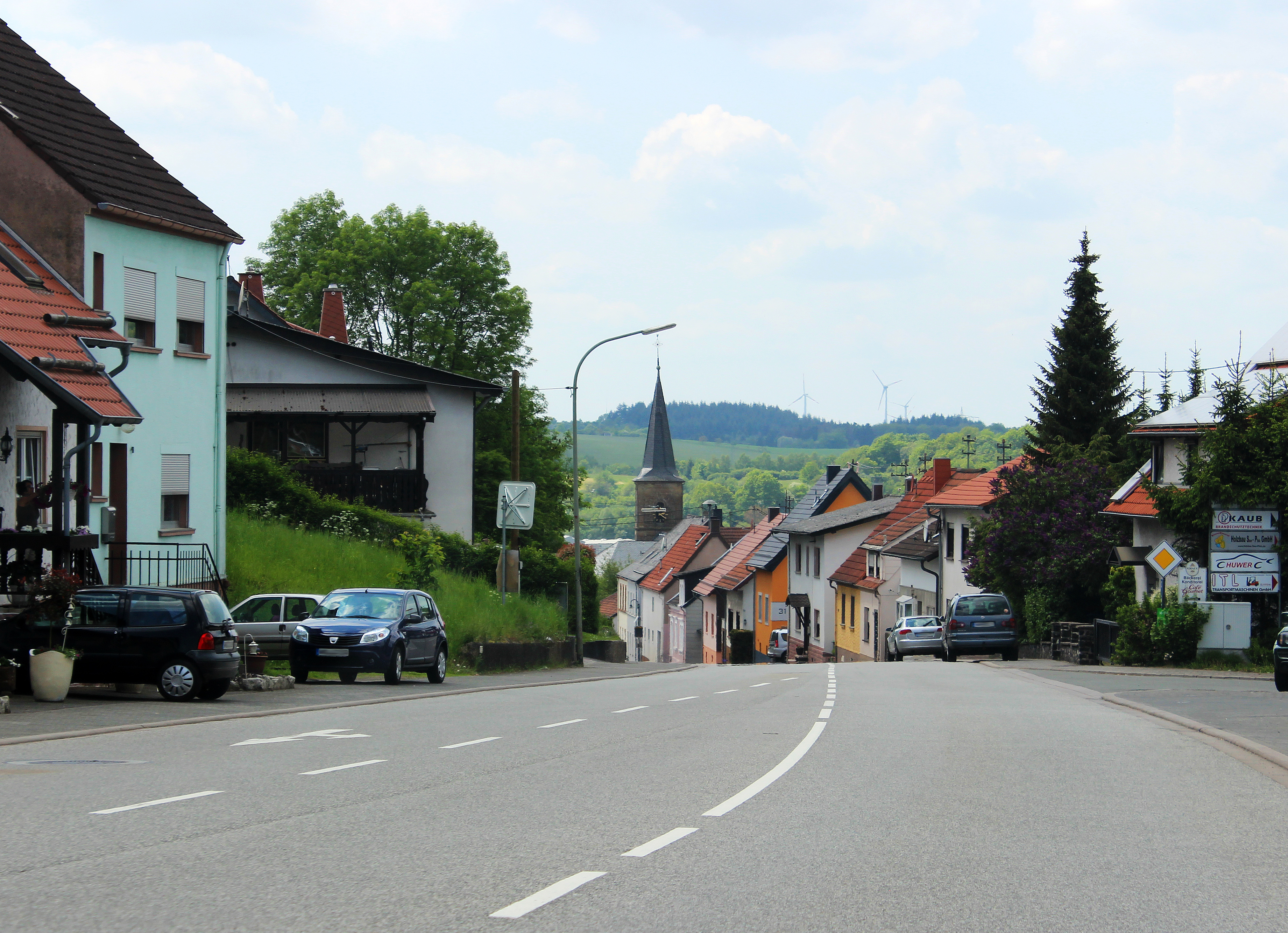 Baumholder Straße in Freisen, Gemeinde Freisen, Landkreis St. Wendel, Saarland.